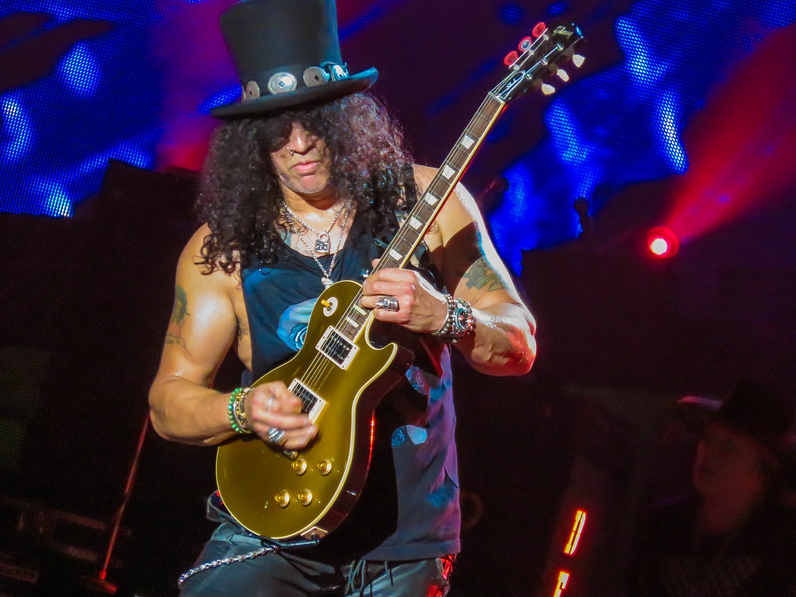 Guns n´Roses Palacio de los Deportes 30/11/2016